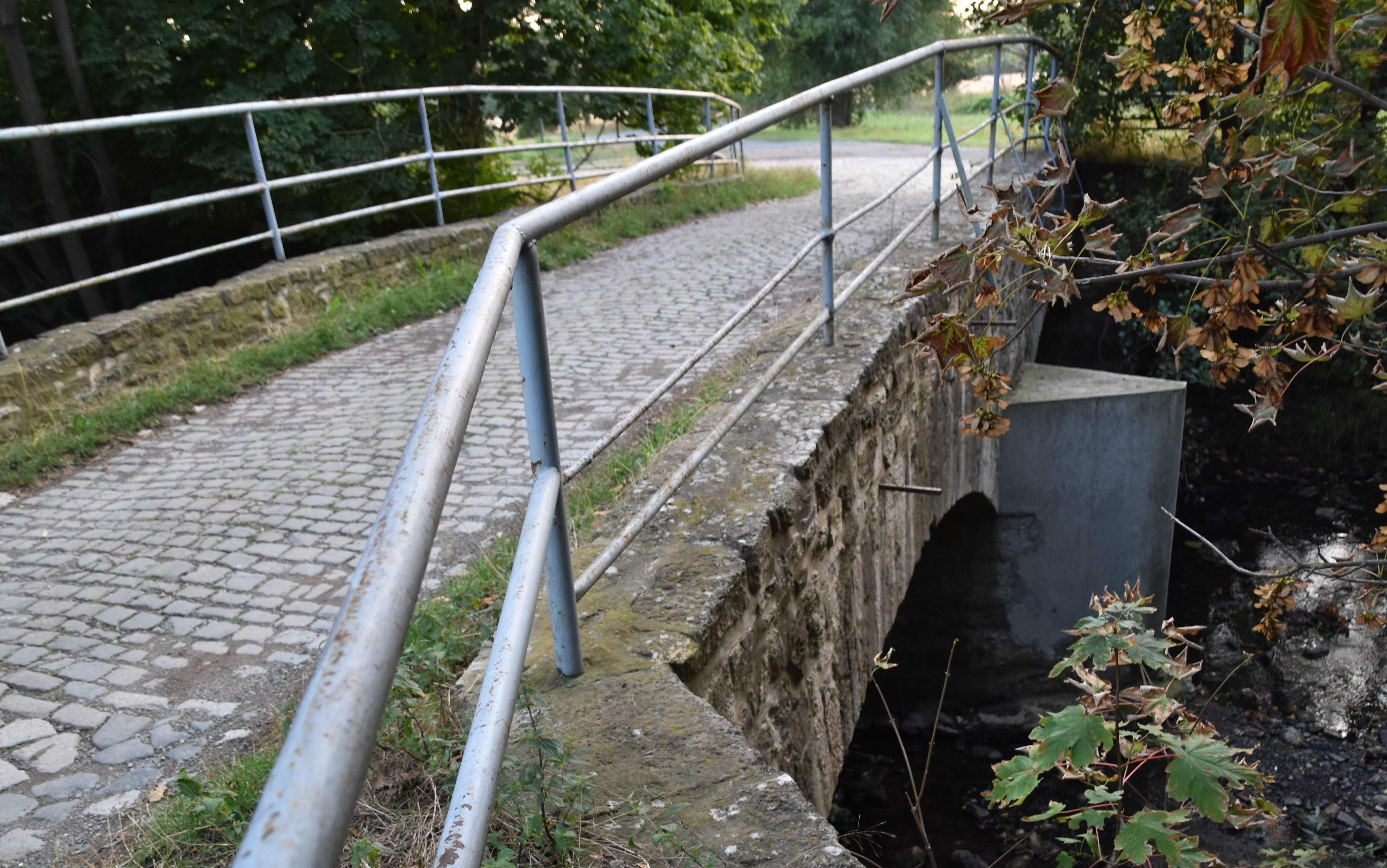 Selkebrücke an der Verlängerung der Poststraße in Hausneindorf